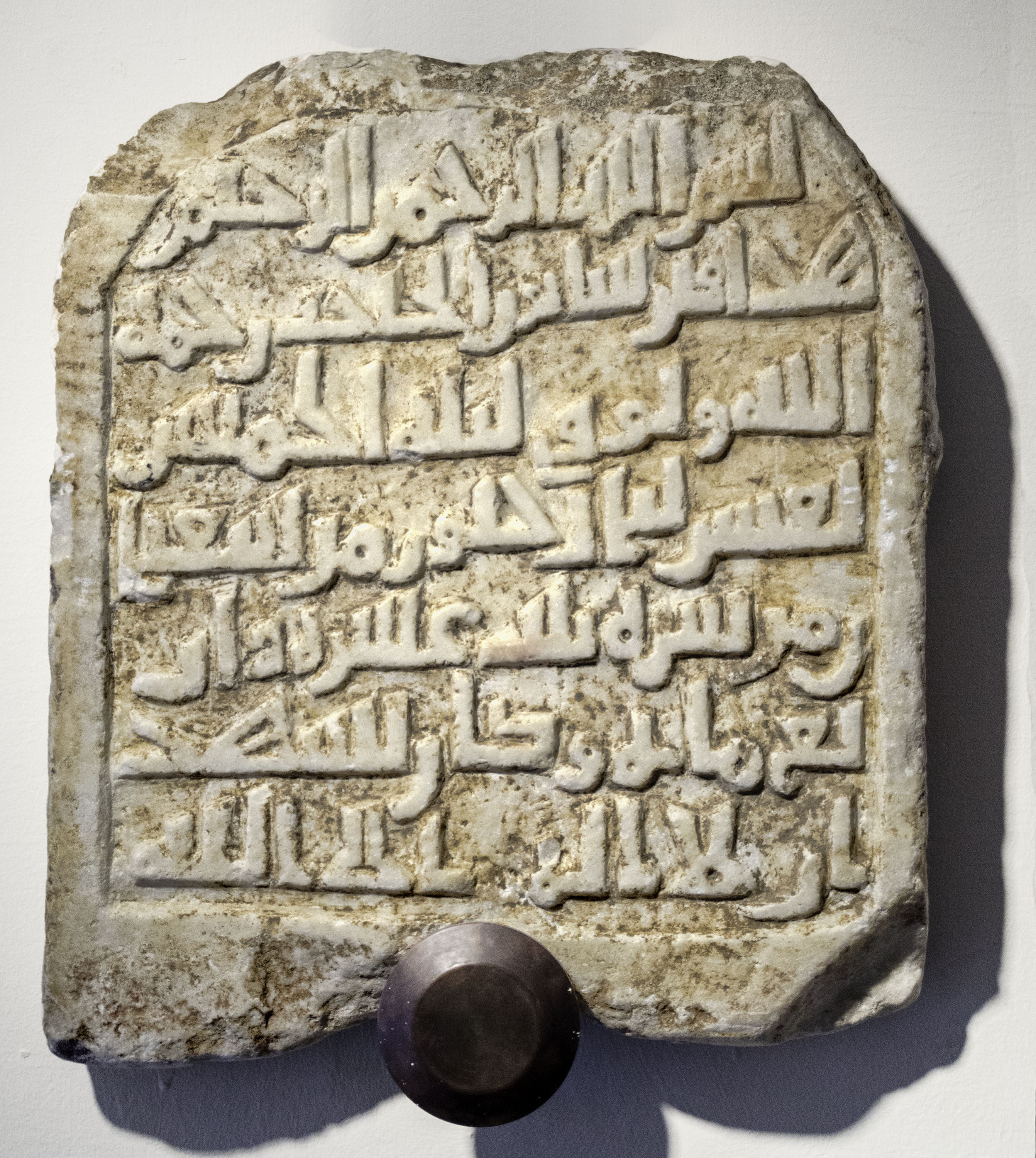 Sapur fue el primer rey Taifa de Badajoz. Esta lápida fue encontrada en la alcazaba de la ciudad. Identifica el sepulcro del hayib Sapur muerto en el año 413 de la Hégira (1022 en nuestra cronología). Está en el Museo Arqueológico Provincial de Badajoz.